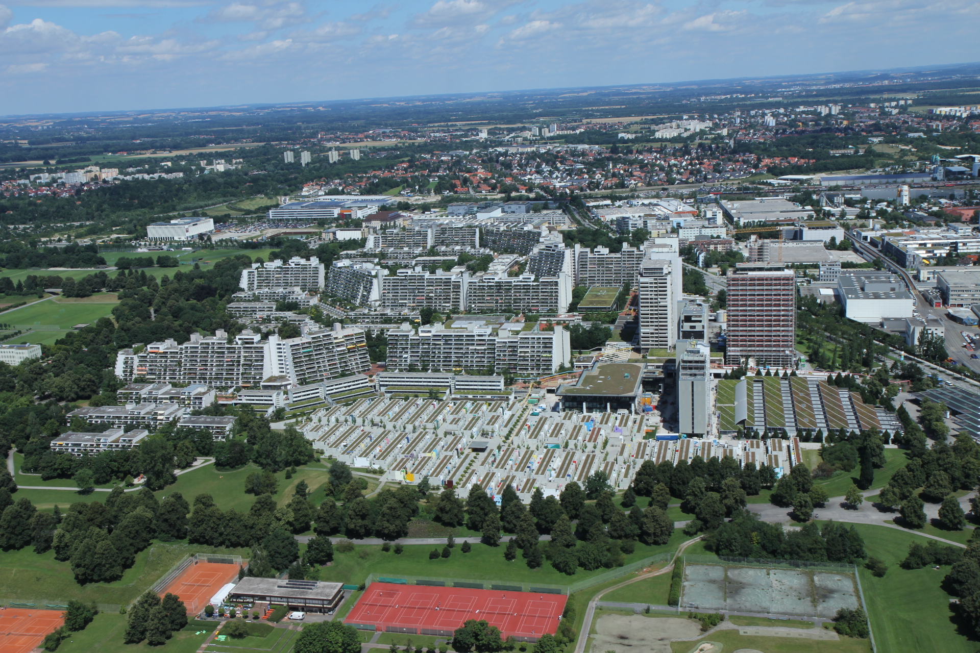 Wikipedia im Landtag – Bayern 17. bis 19. Juli 2012 in München Dieses Foto wurde im Rahmen des Projektes „Wikipedia im Landtag“ erstellt.